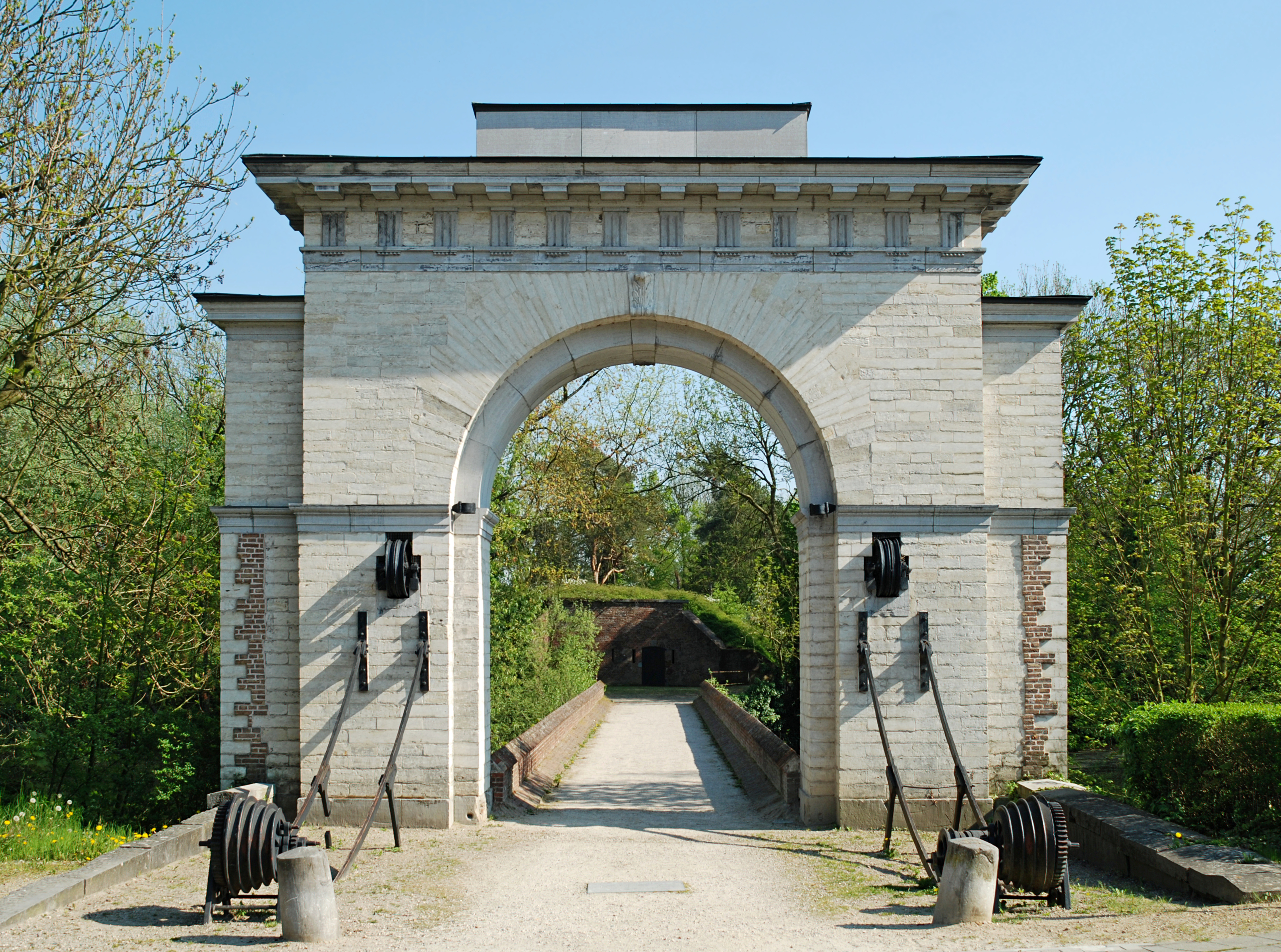 Belgique - Termonde - Porte de Bruxelles (néo-classique 1822)